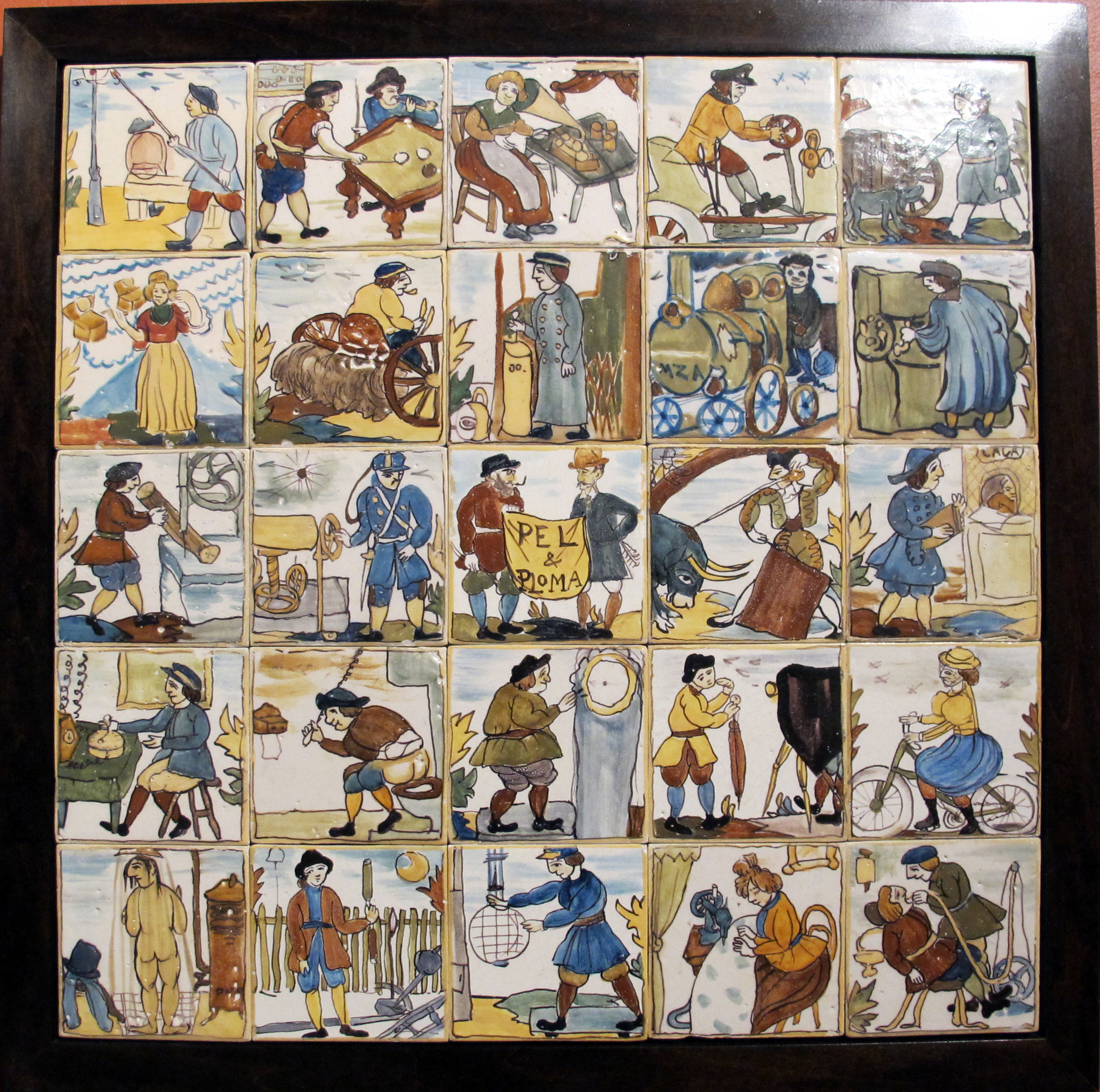 Hispanic Society of America